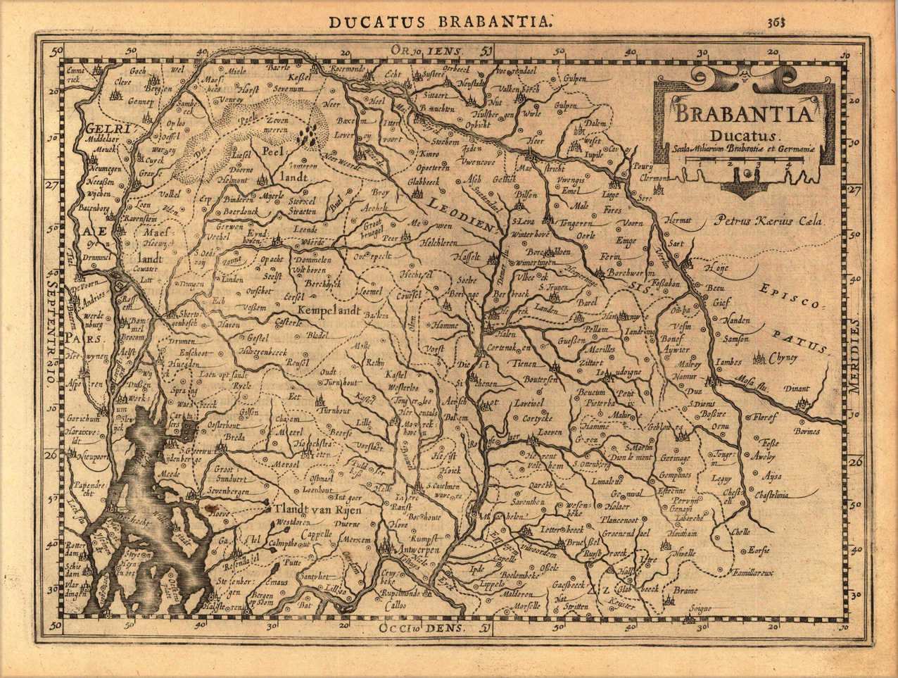 Kaart (1632) van het Hertogdom Brabant met vermelding van het Kempenland, door Mercator, uitgave van Johannes Cloppenburch. Origineel exemplaar te vinden in de Universiteitsbibliotheek Amsterdam (Atlas Minor3: UBA 1803 D 7 (1632)) .